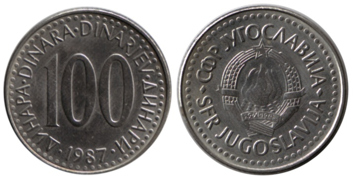 100 jugoslawische Dinar hochgeladen von: Roger Zenner Anmerkungen: aus meiner privaten Sammlung